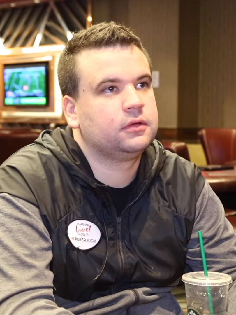 Christian Harder bei der WPT Maryland 2018